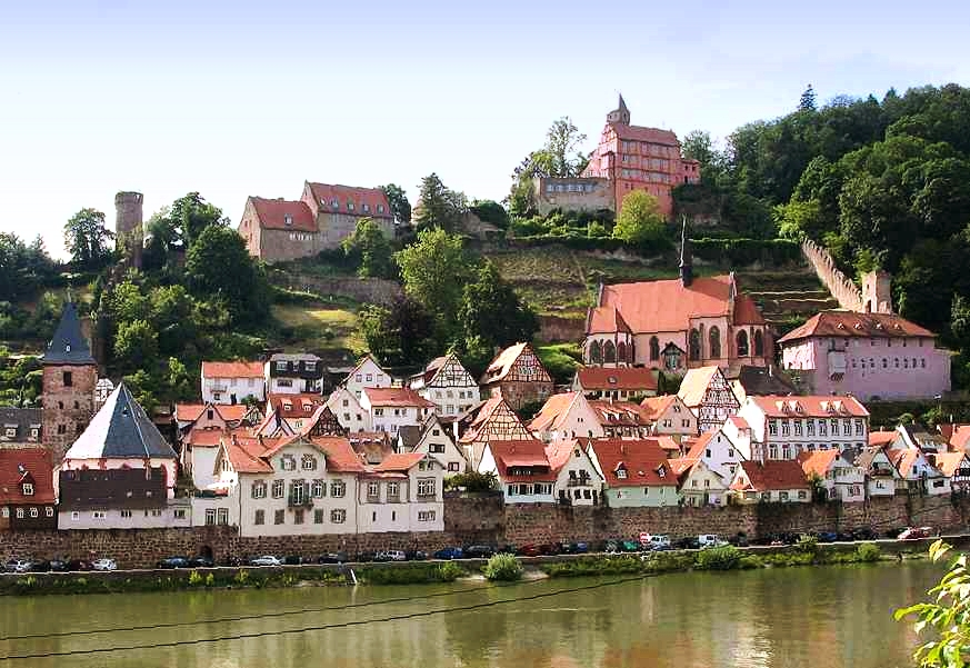 Burg Hirschhorn über Hirschhorn am Neckar, Deutschland, Hessen